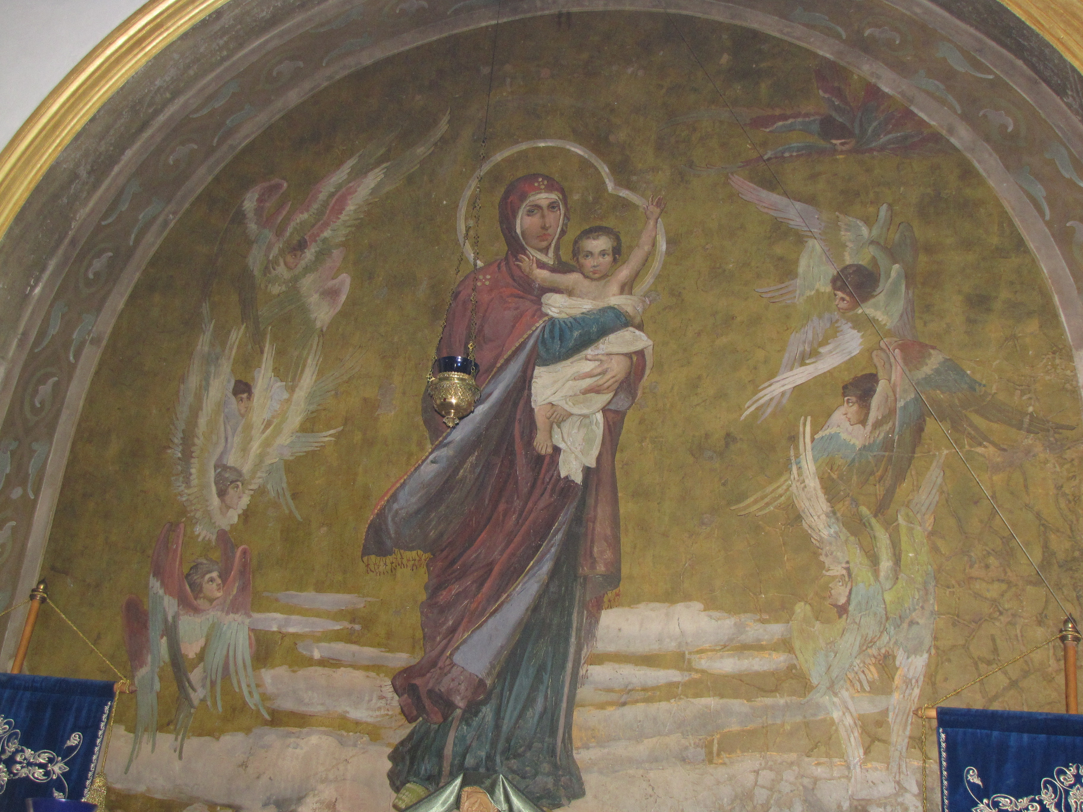 фреска образа Пресвятой Богородицы "Благодатное Небо", Церковь Покрова Пресвятой Богородицы, село Покровское Горноуральского городского округа Свердловской области